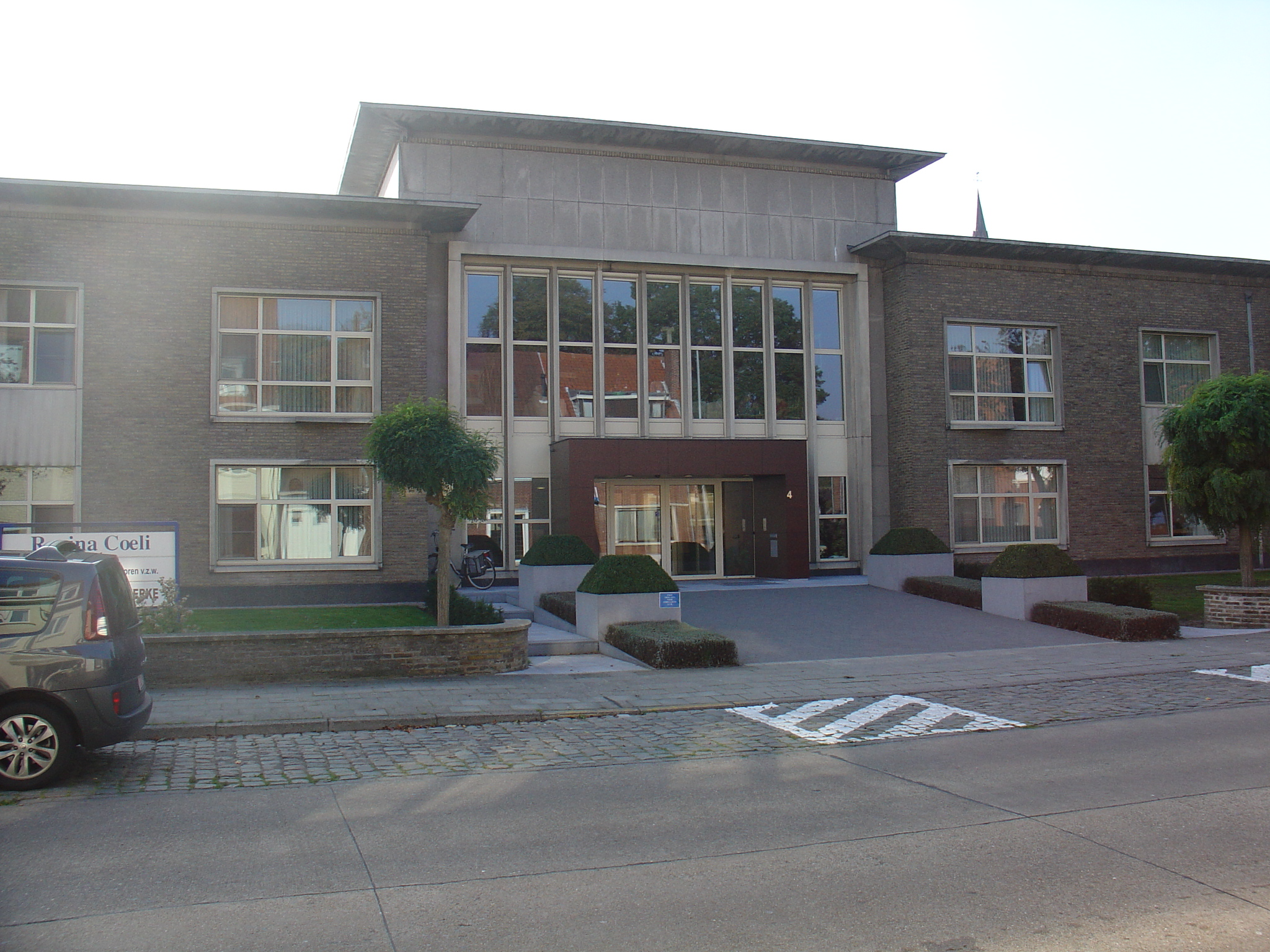 Rustoord Regina Caeli